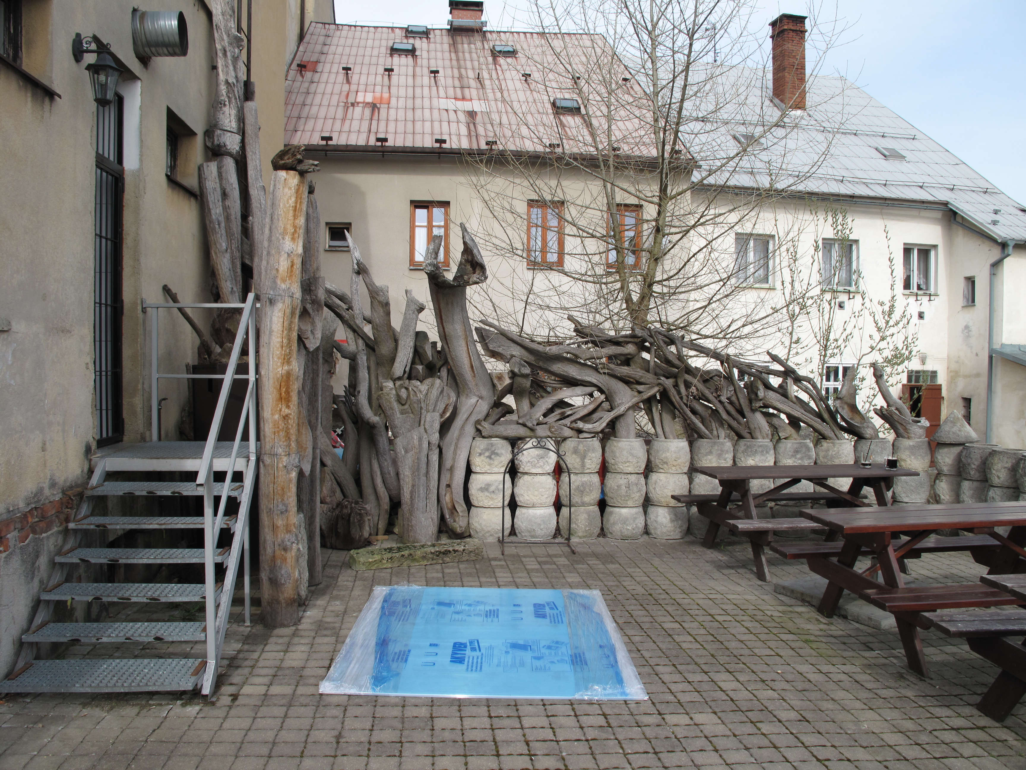 Český Dub I. Okres Liberec, Česká republika.